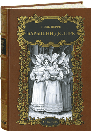 Couverture d'une édition russe des Demoiselles de Liré par Paul Perret